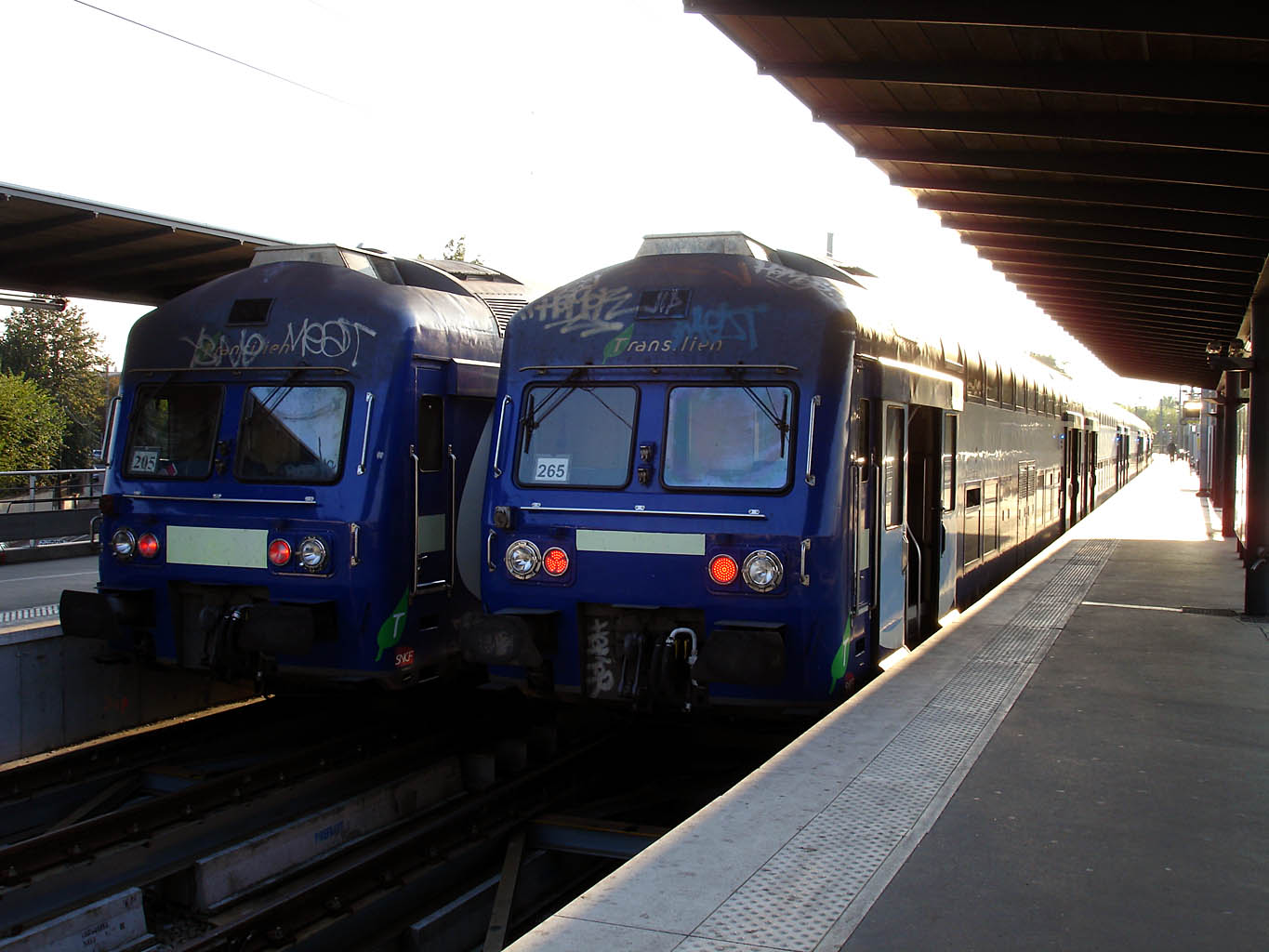 Gare d'Ermont - Eaubonne (Val-d'Oise)